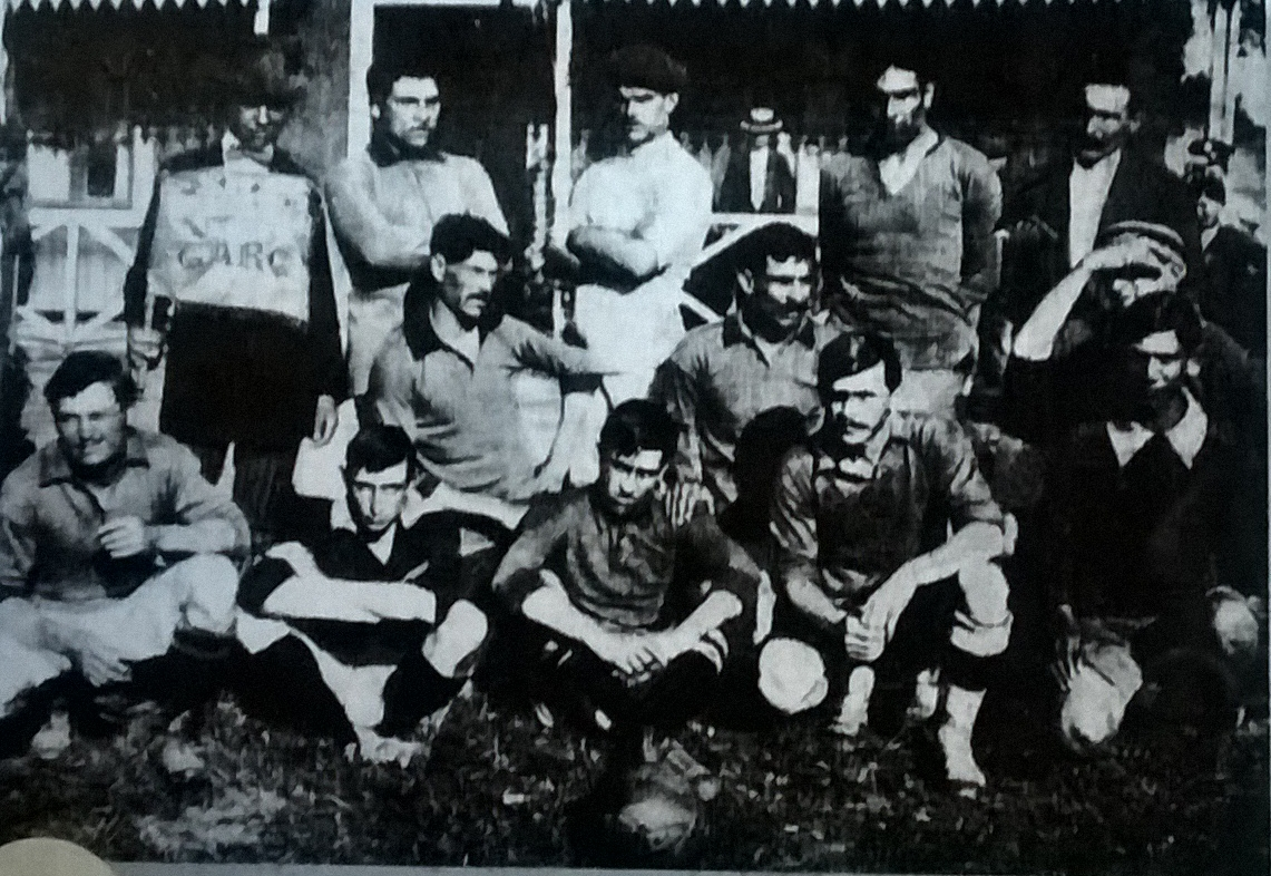 Equipo de Rosario Central en 1912. Arriba: Ignacio Rota, Augusto Winn y Zenón Díaz. Abajo: el penúltimo jugador es Harry Hayes.